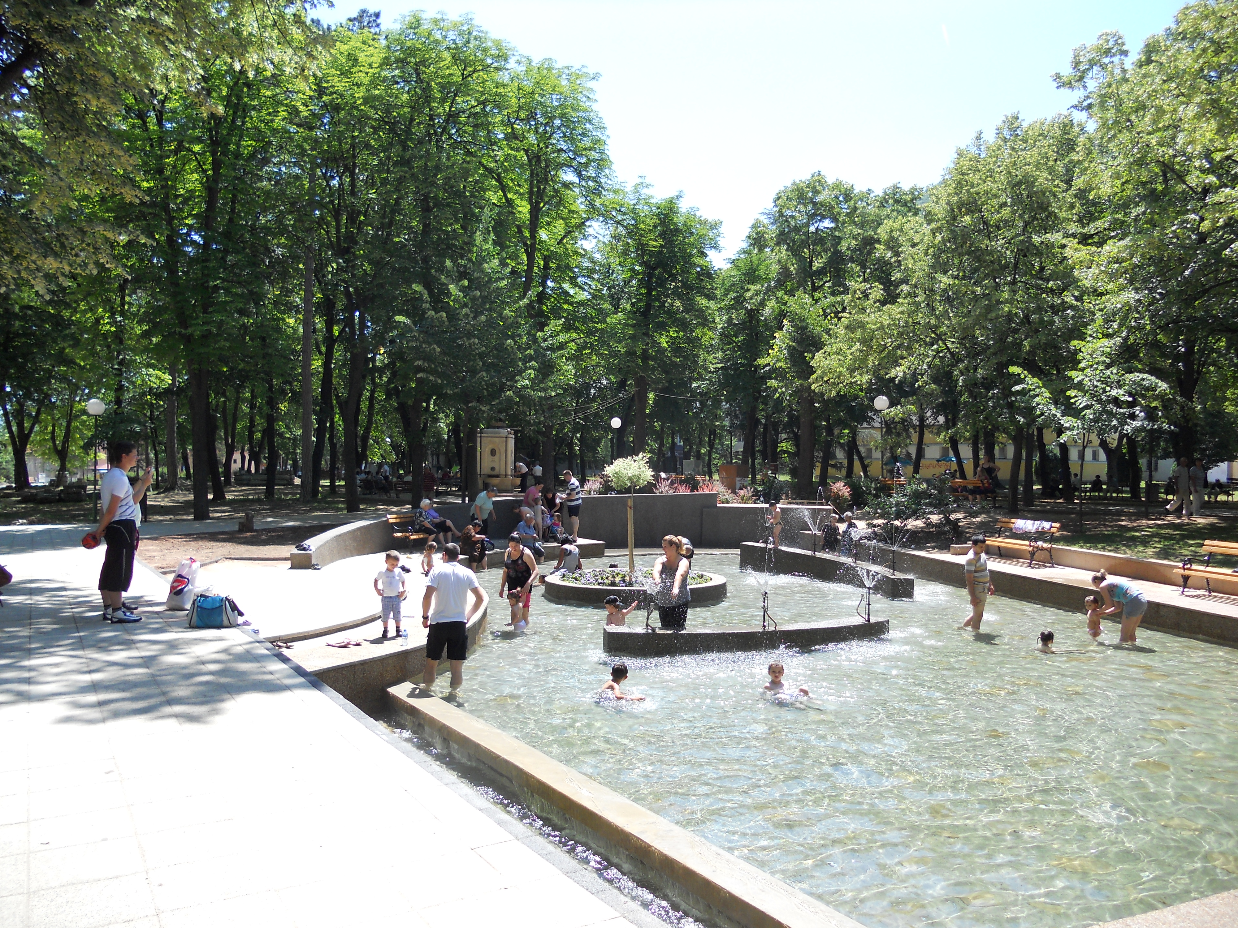 Niška Banja, fontana u parku. Autor: dr Milorad Dimić, Niš, Srbija, 17. jun 2012.